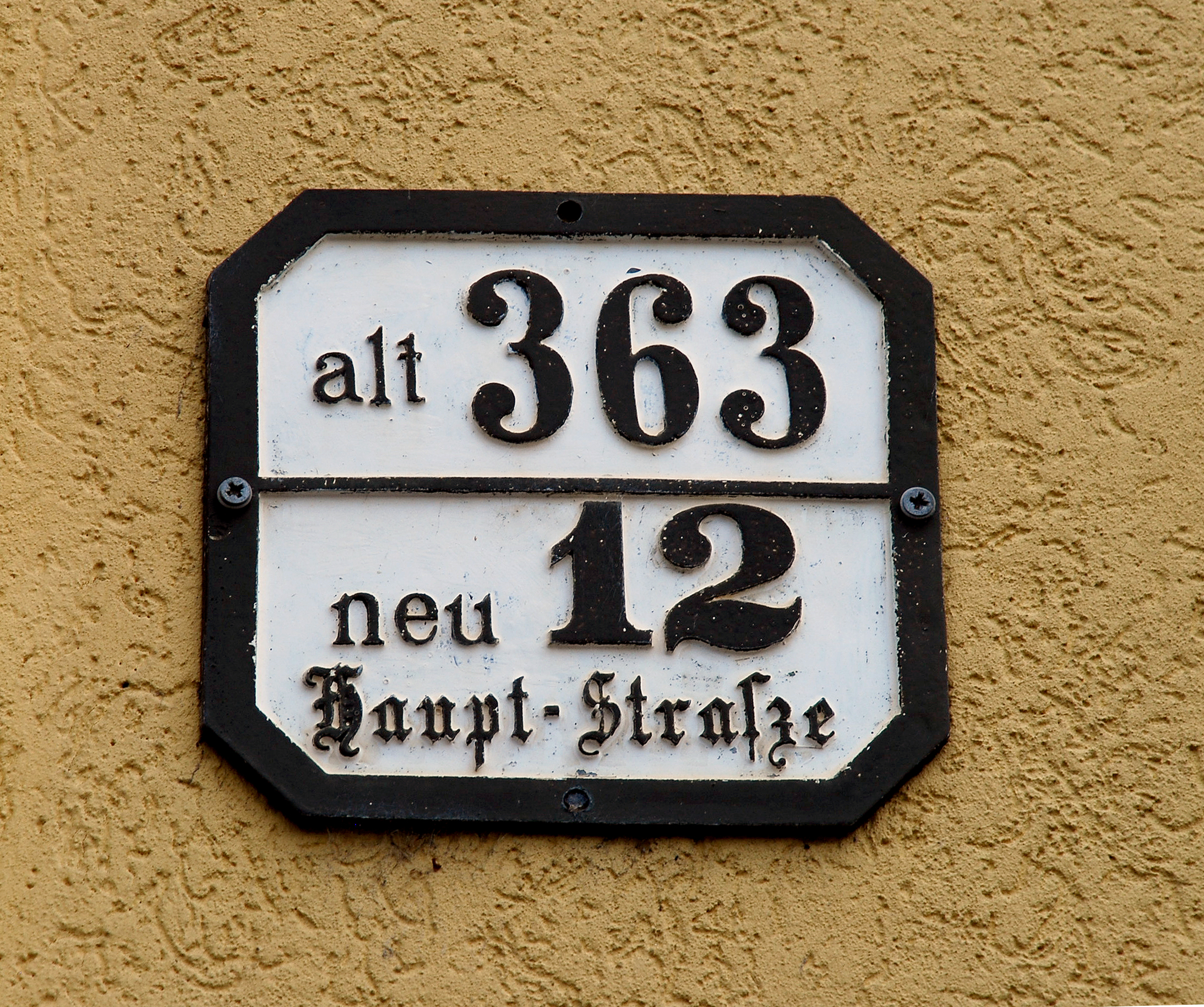 Hausnummernschild mit gemeinsamer Angabe der alten Konskriptionsnummer und neuen Orientierungsnummer in Guntramsdorf, Niederösterreich